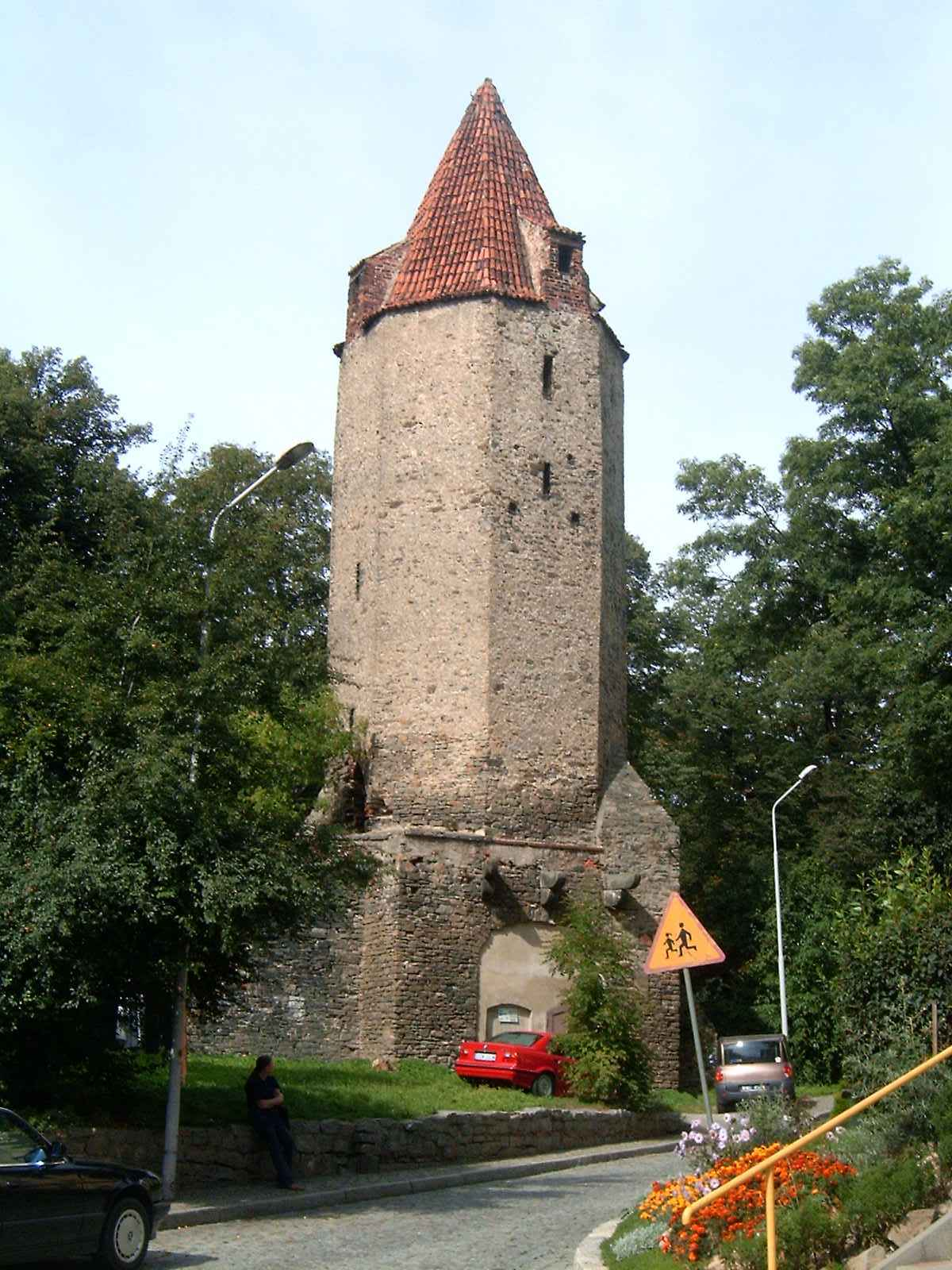 Wieża Dziobowa i mury obronne w Strzegomiu